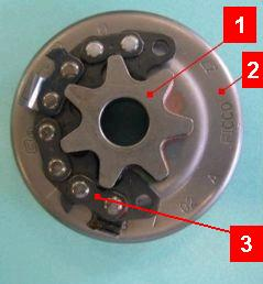 Водещо колело за моторен трион